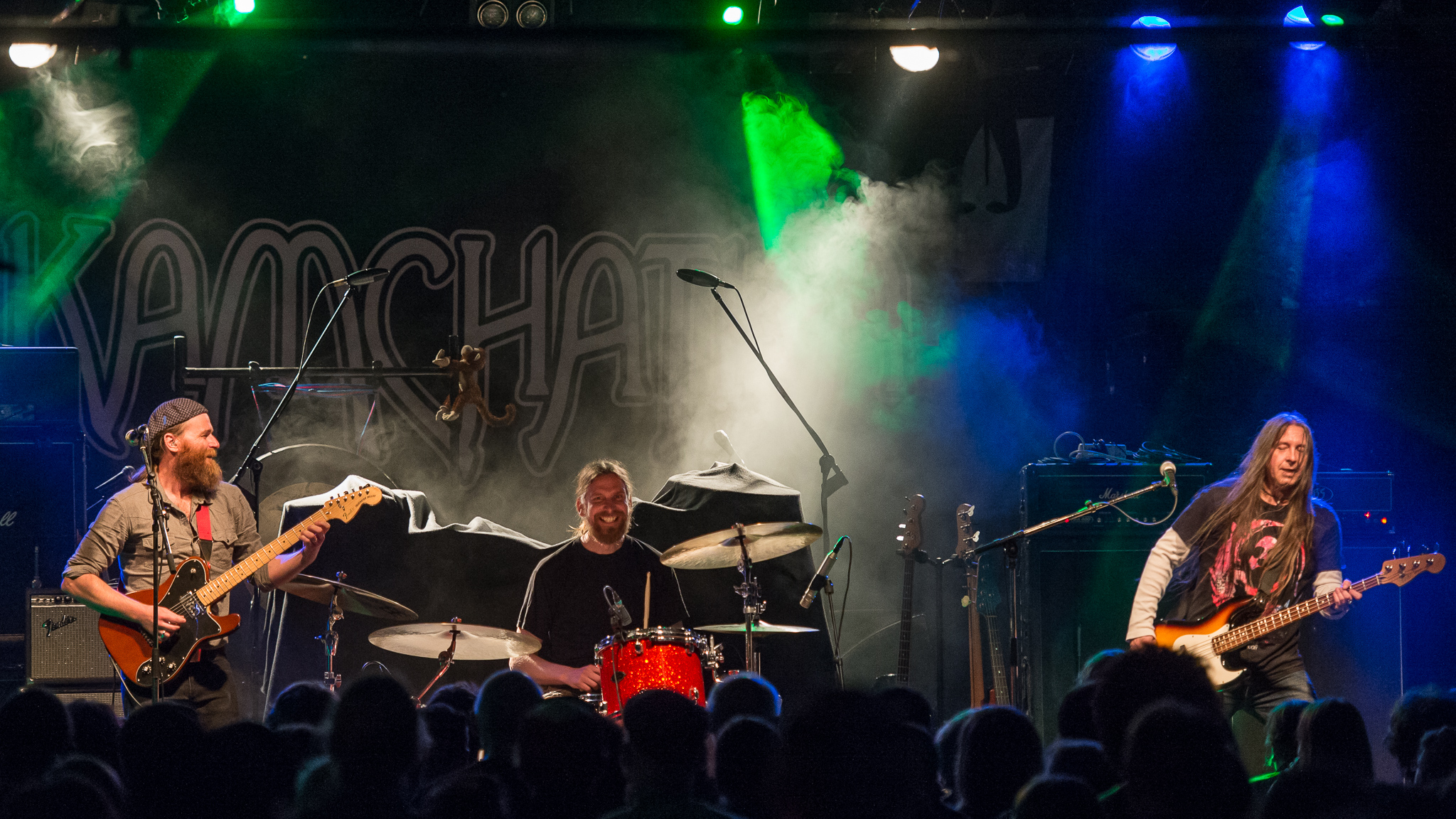 Concertbüro Franken,Der Hirsch,Kamchatka,Konzert,Livekonzert,Livemusik,Musik,Per Wiberg,Thomas "Juneor" Andersson,Tobias Strandvik